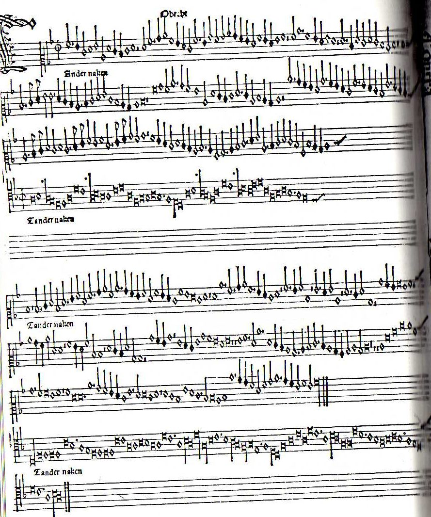 Fragment van de zetting van Tandernaken (T'Andernaken) door Jacob Obrecht, uitgegeven door de Venetiaanse drukker Ottaviano Petrucci in 1501 in de bundel Odhecaton A.